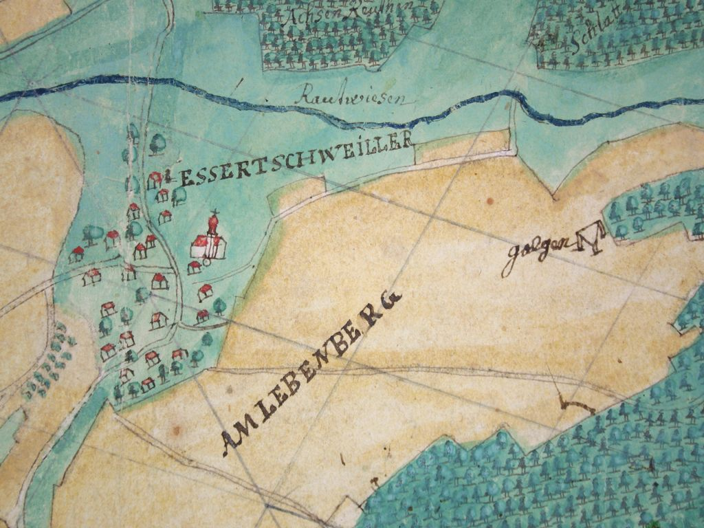 Esseratsweiler, Detail einer Karte der Herrschaft Achberg Collection: Staatsarchiv Sigmaringen Ho 86 T 1 Nr. 447